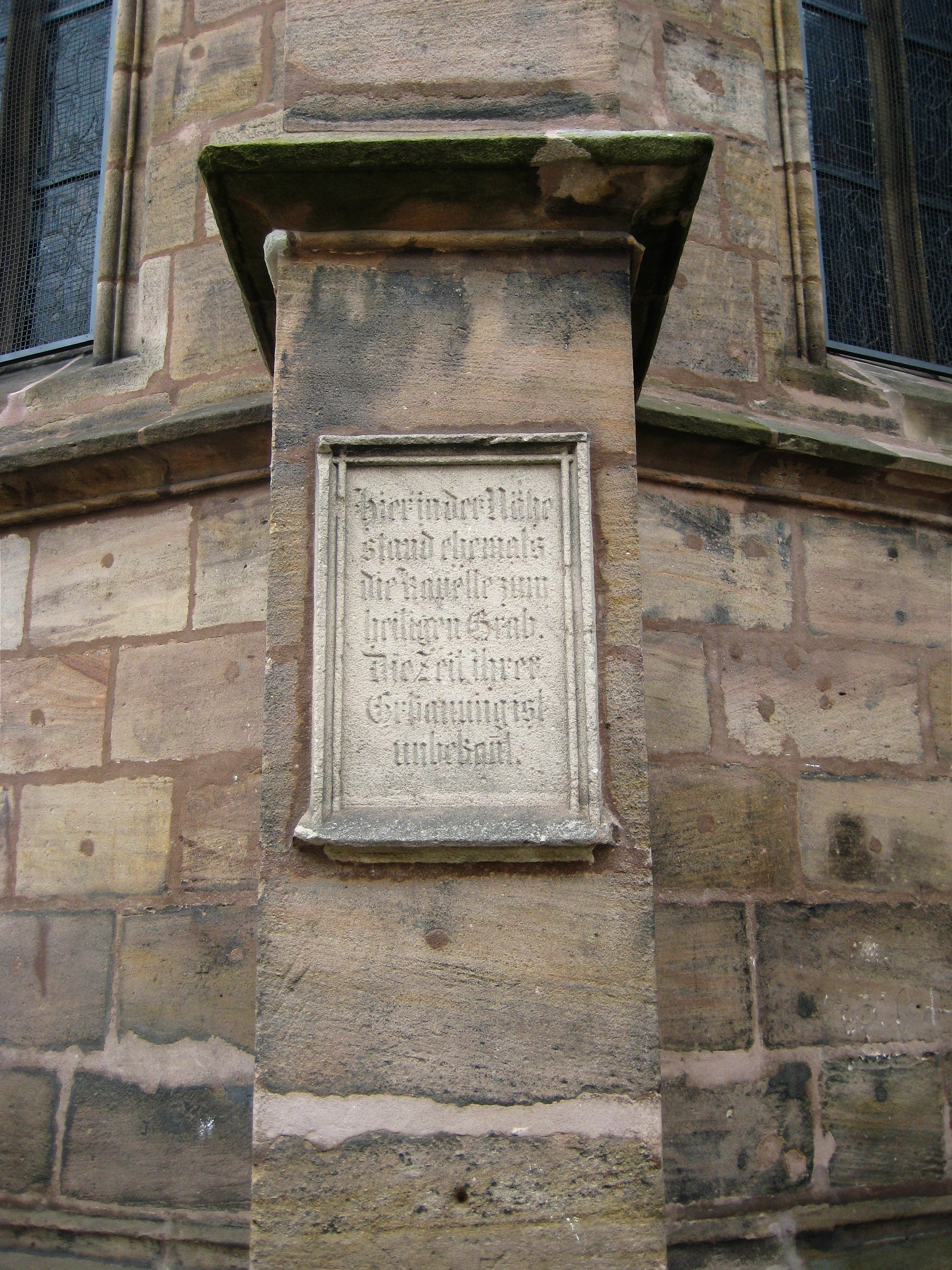 Gedenktafel für die Heilig-Grab-Kapelle an der Nordseite des Chors von St. Michael in Fürth. Der Text lautet: Hier in der Nähe stand ehemals die Kapelle zum heiligen Grab. Die Zeit ihrer Erbauung ist unbekannt.